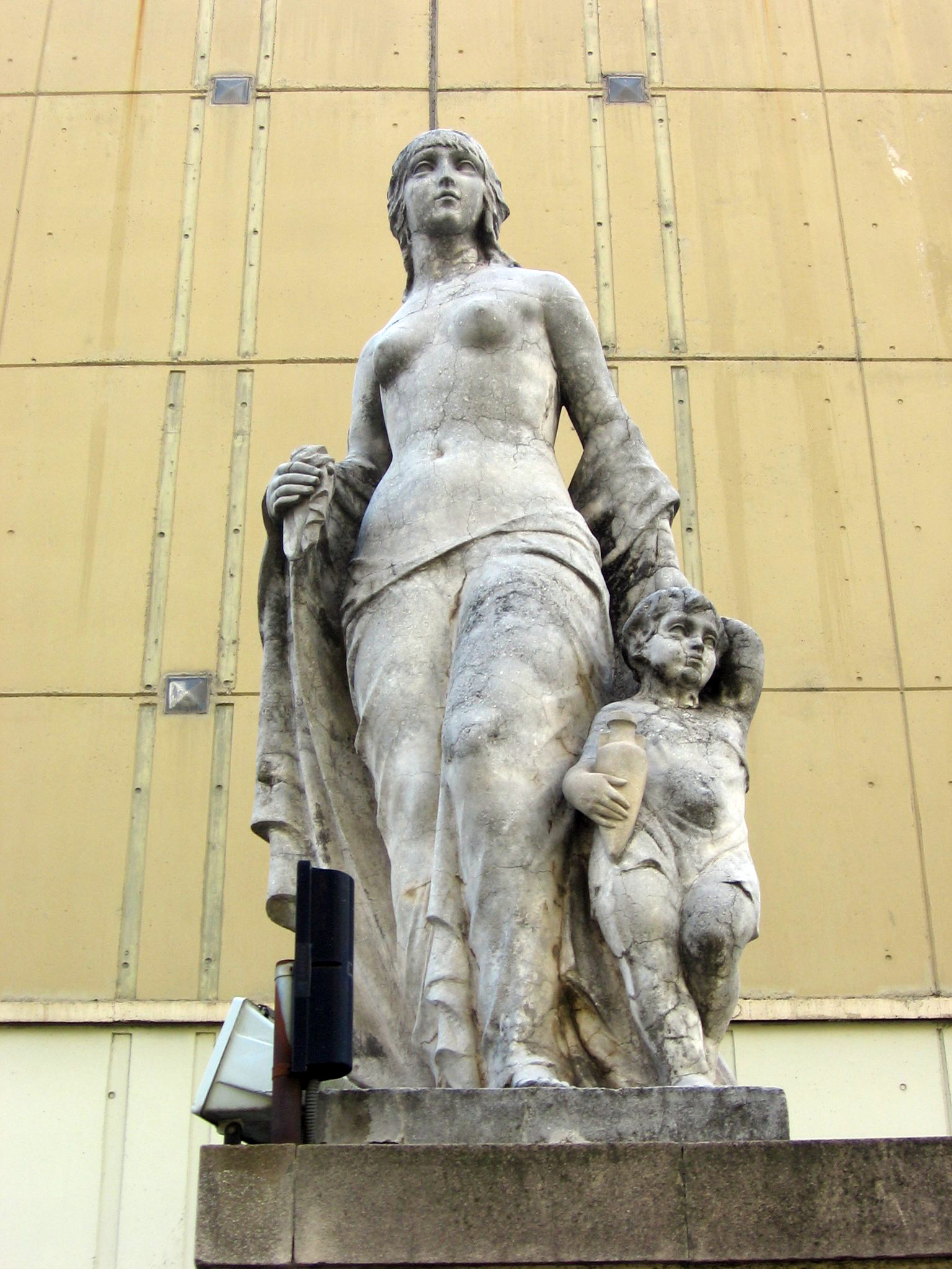 Als peus de les torres venecianes de la plaça d'Espanya hi havia una balustrada d'accés al recinte de l'Exposició decorada amb quatre escultures: les Arts i la Indústria, de Carles Ridaura; el Comerç, d'Enric Monjo; i l'Esport, de Josep Viladomat. Aquesta balustrada va ser eliminada els anys 1970 durant una reurbanització de la plaça degut a les obres del metro, i juntament amb ella van desaparèixer les estàtues; tan sols es va conservar una, la de les Arts —també anomenada Dona amb nen—, traslladada a un lloc proper, a l'avinguda del Paral·lel prop de la cantonada amb el carrer de Lleida